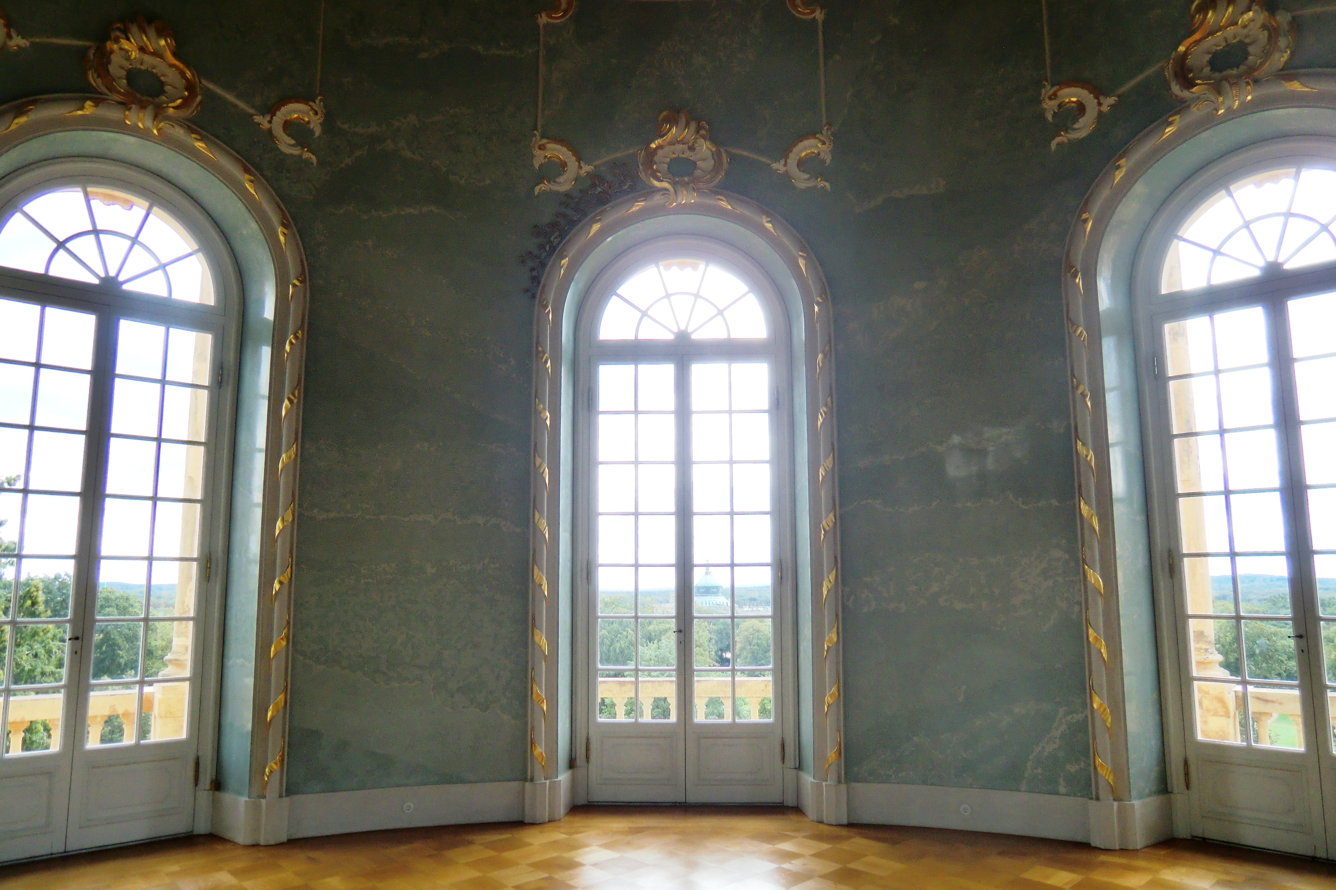 Belvedere auf dem Klausberg in Potsdam. Oberer Raum des Gebäudes.